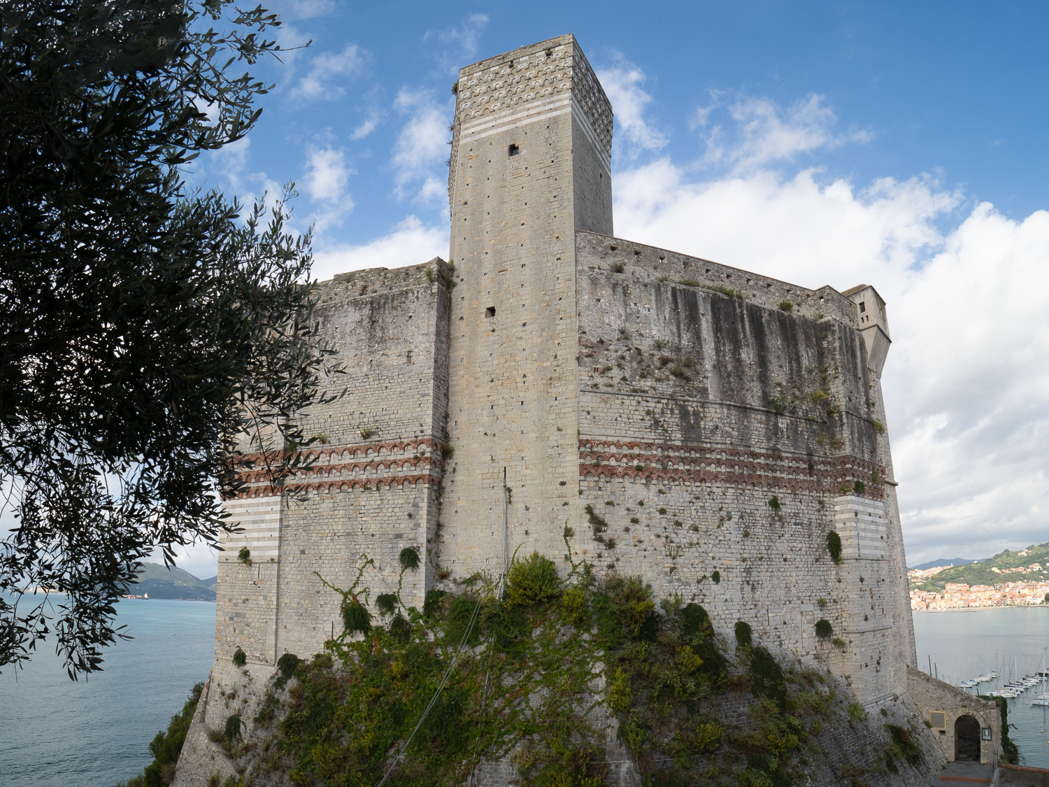 castello di Lerici This is a photo of a monument which is part of cultural heritage of Italy.